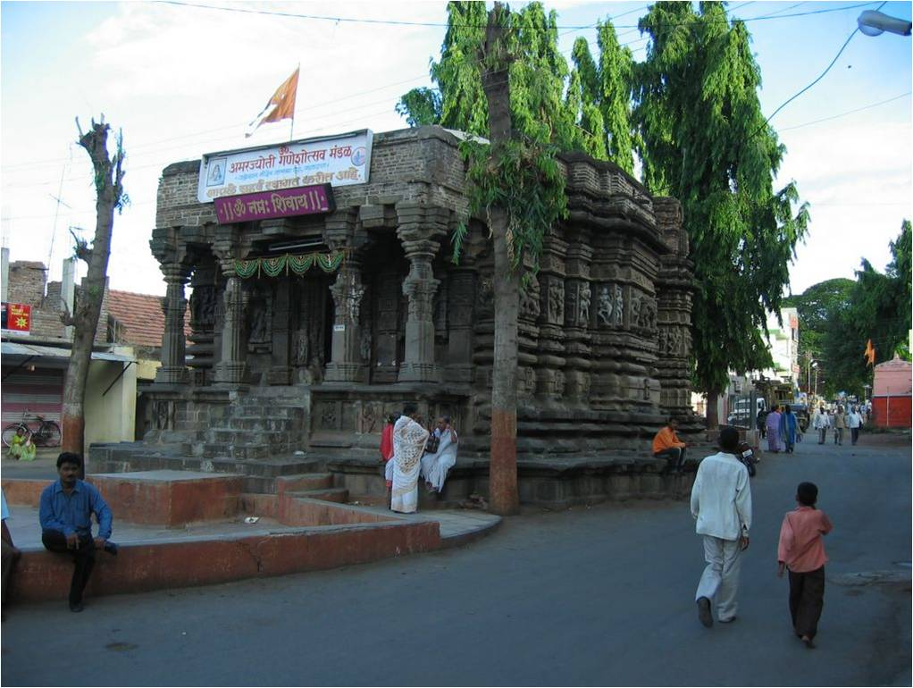 जबरेश्वर मंदिर ,फलटण